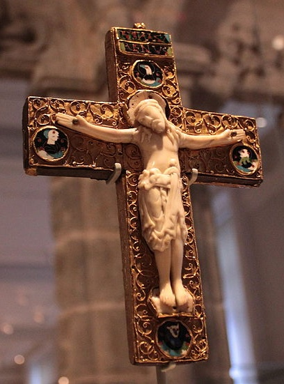 see original file